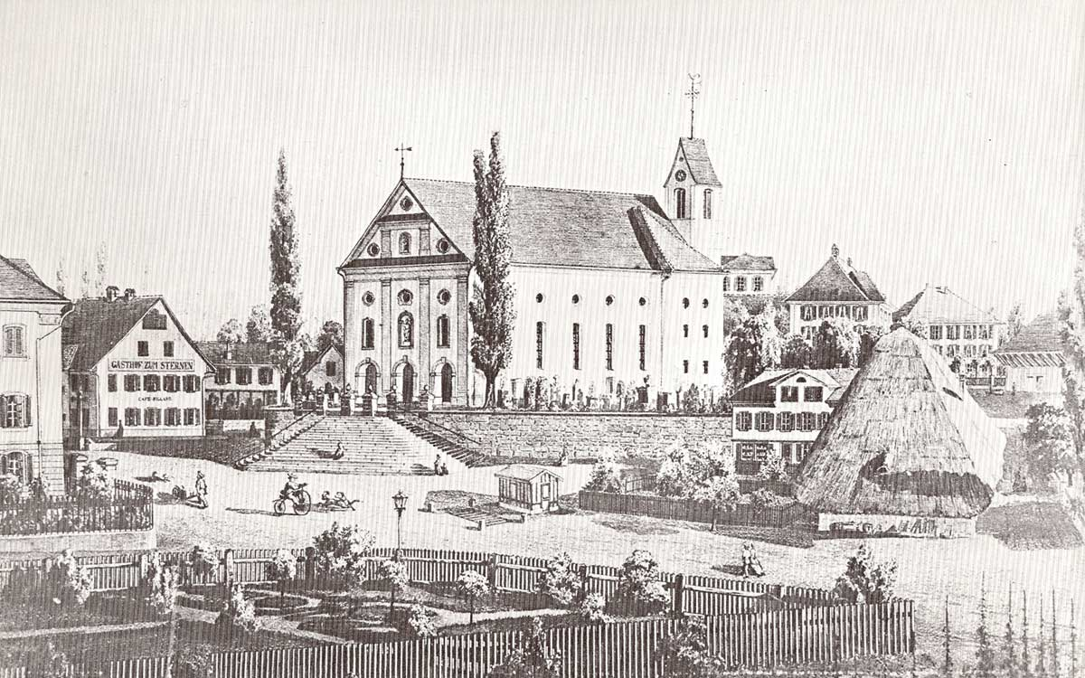 Wohlen: Ansicht des Kirchenplatzes mit Emanuel-Isler-Haus (links), Gasthof Sternen (hinten links), Pfarrkirche St. Leonhard (mitte) und ehemalige Pfarrscheune (rechts)